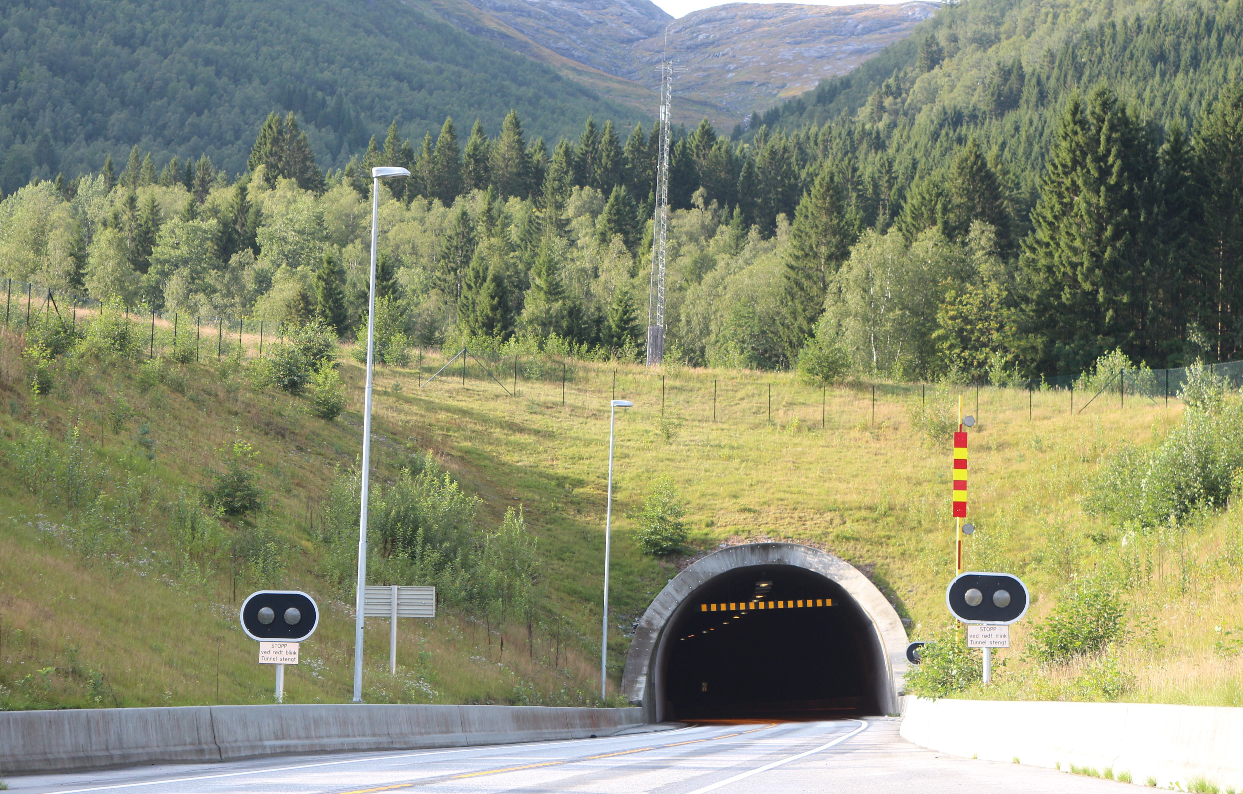 Kvivstunnelen